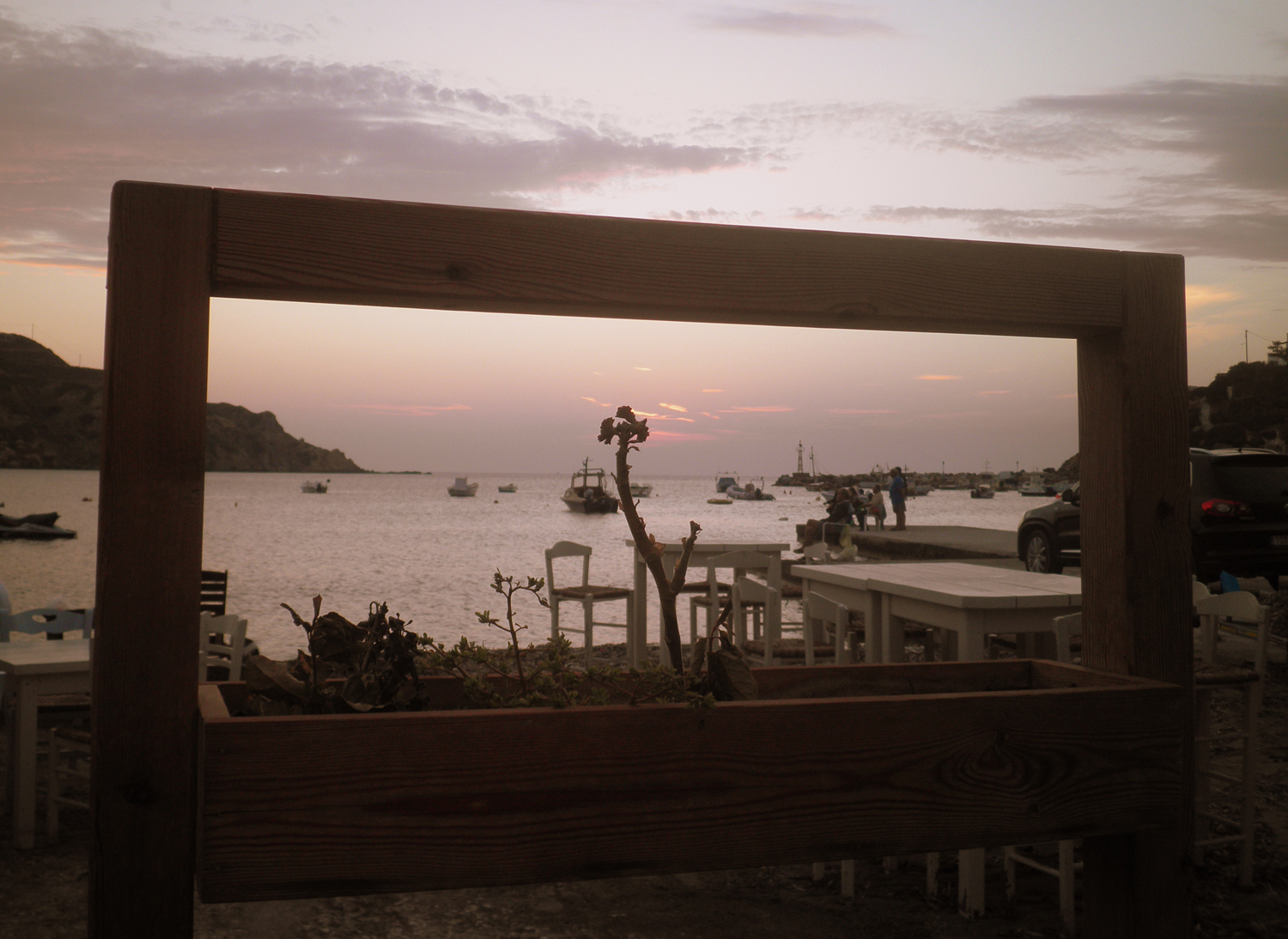 Το Κίνι Σύρου σε κάδρο